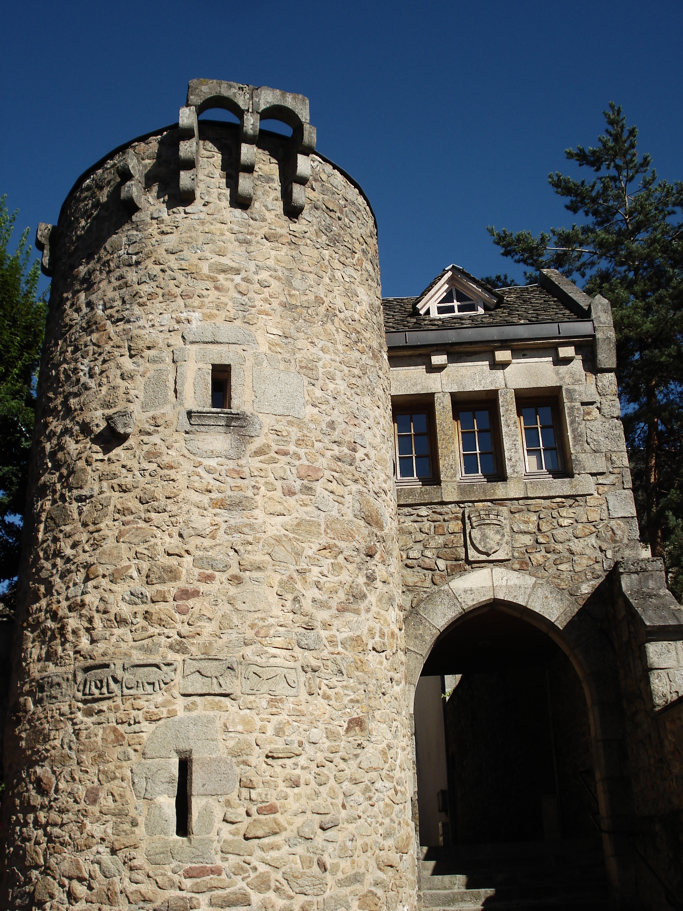 Neuvic en Corrèze : la Tour des 5 pierres